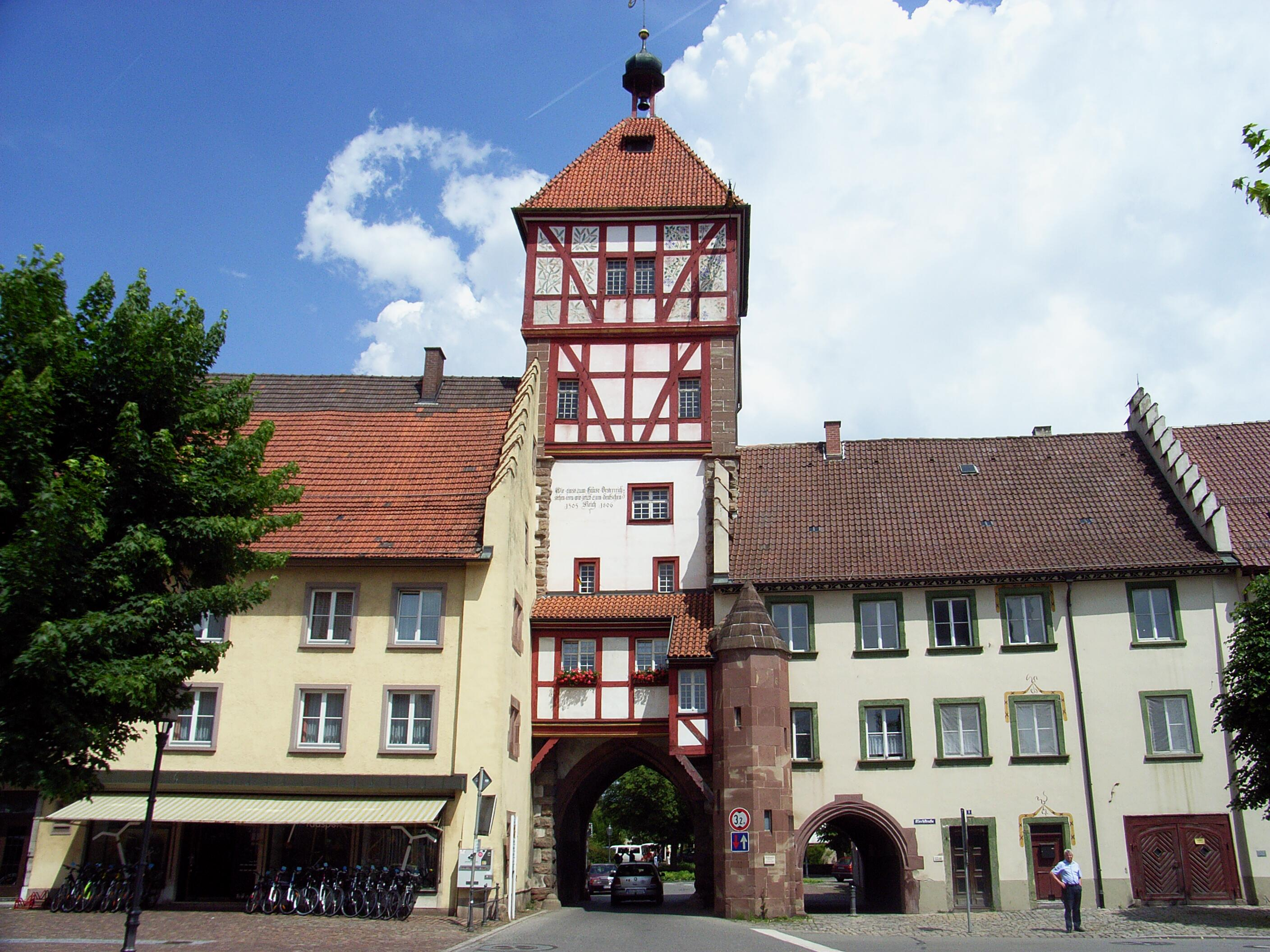 Dieses Bild zeigt das Mühlentor in Bräunlingen.